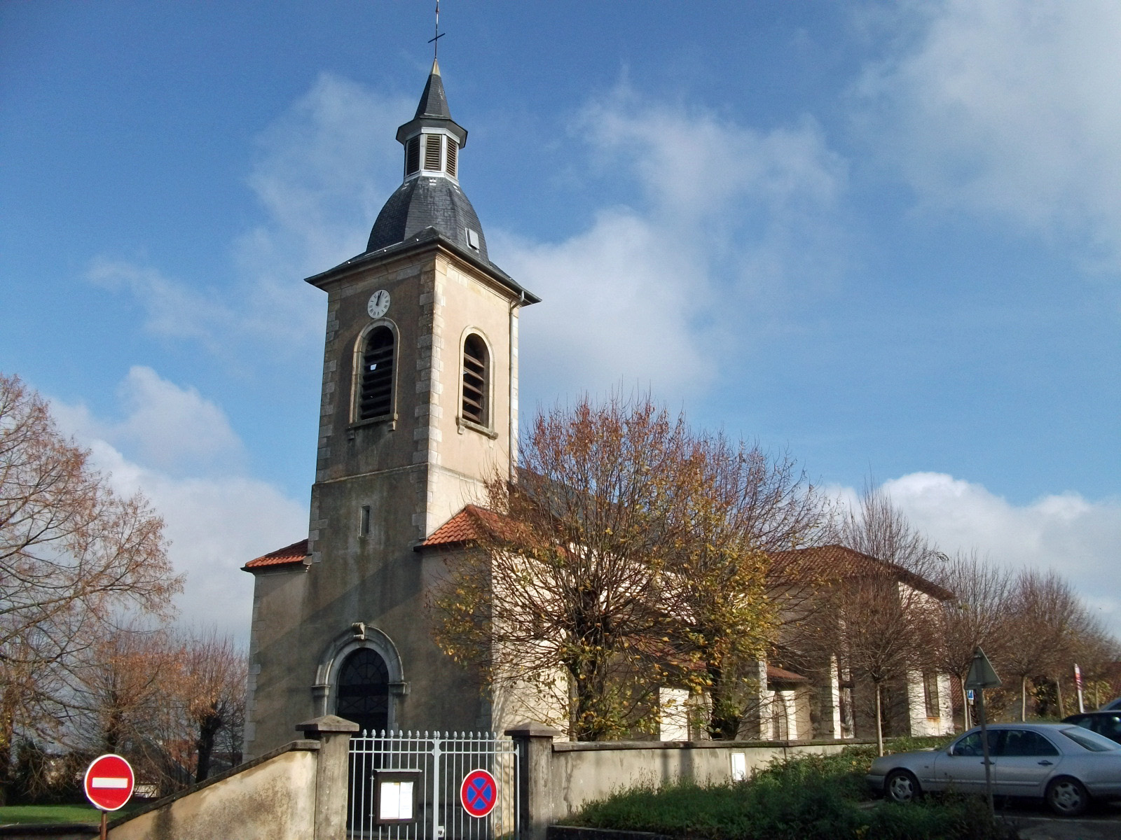 l'église de Frouard dédiée à Jean le Baptiste.